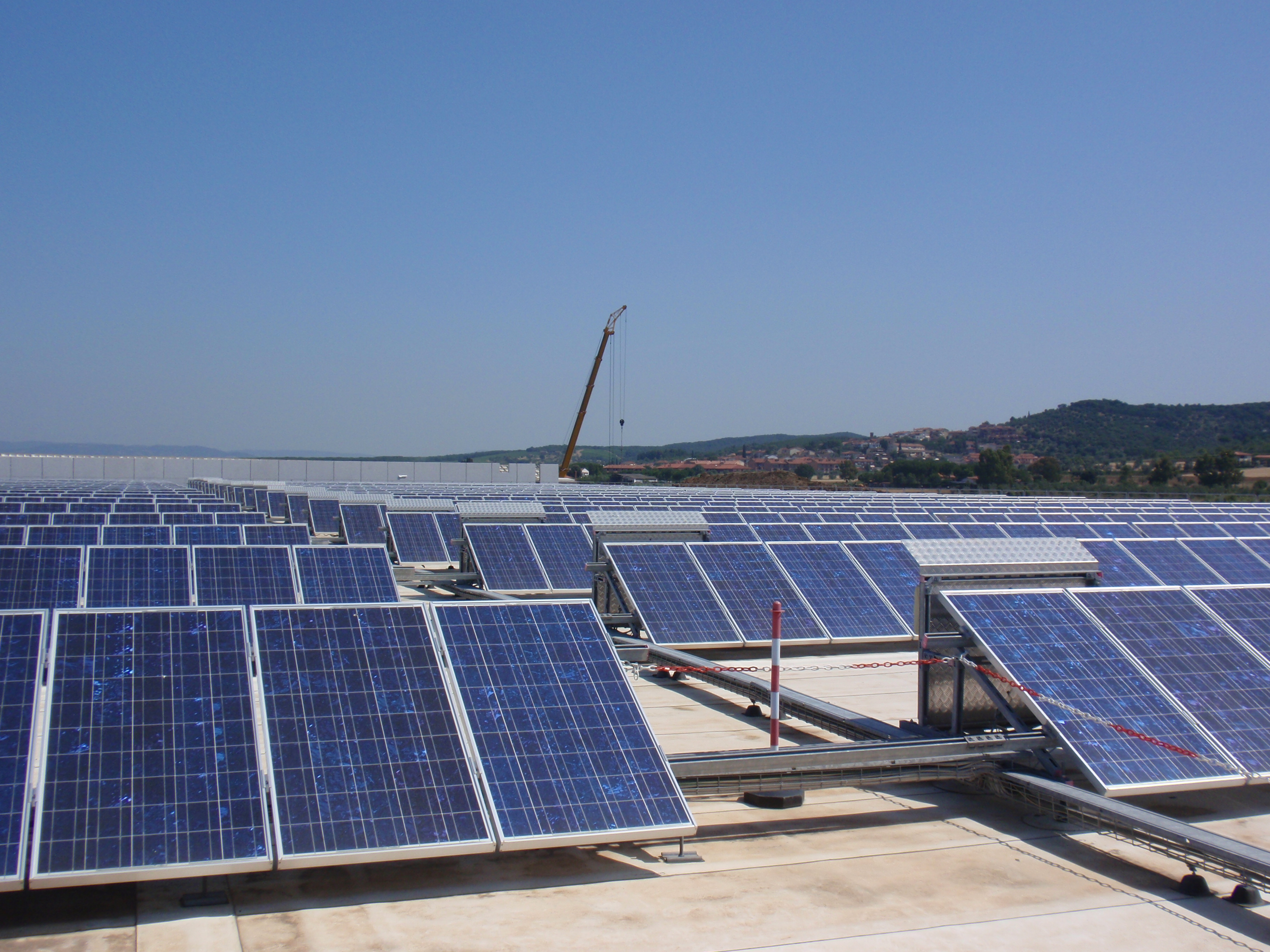 Impianto fotovoltaico presso la sede di Unicoop Tirreno a Vignale Riotorto (Piombino - Livorno)